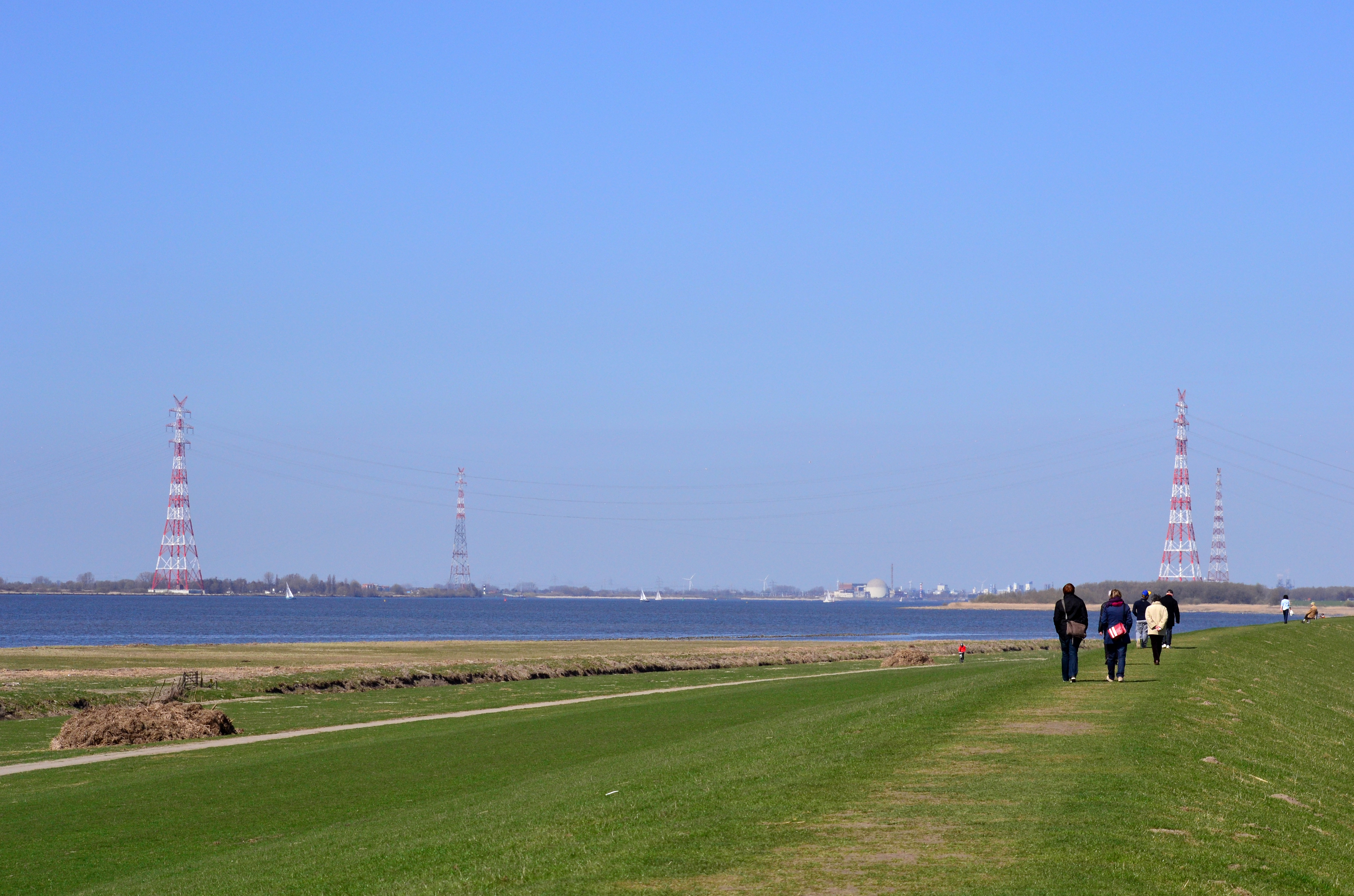 Blick von Fährmannssand über die Elbe nach Lühesand (links) und Hetlinger Schanze (rechts) Glechzeitig zu sehen sind die Masten der Elbekreuzung 2 (vorgrund) und der Elbekreuzung 1 (hintergrund).